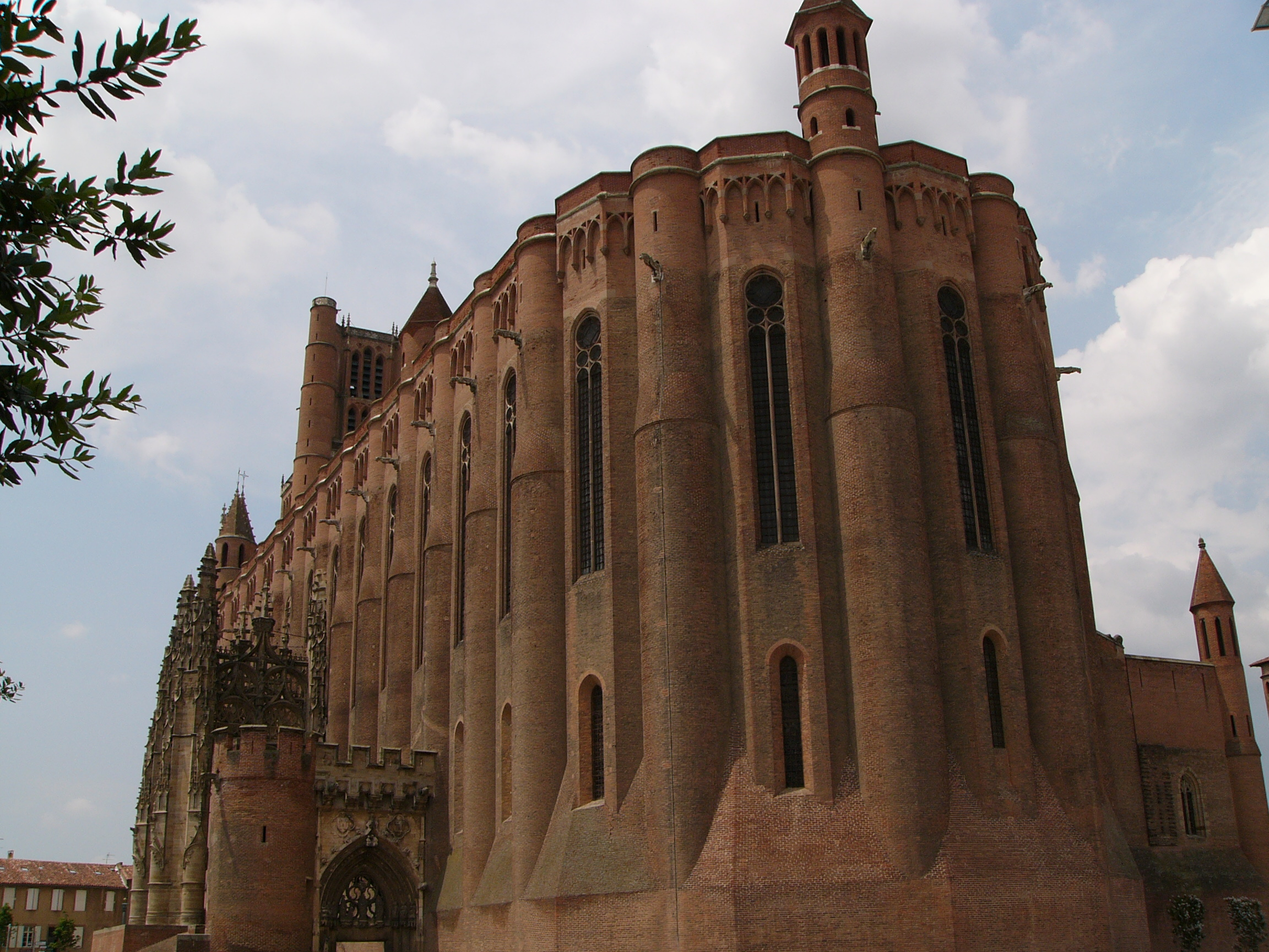 Kathedraal van Albi